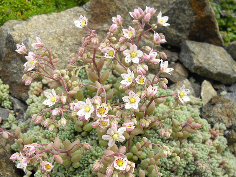 Sedum dasyphyllum var. glanduliferum